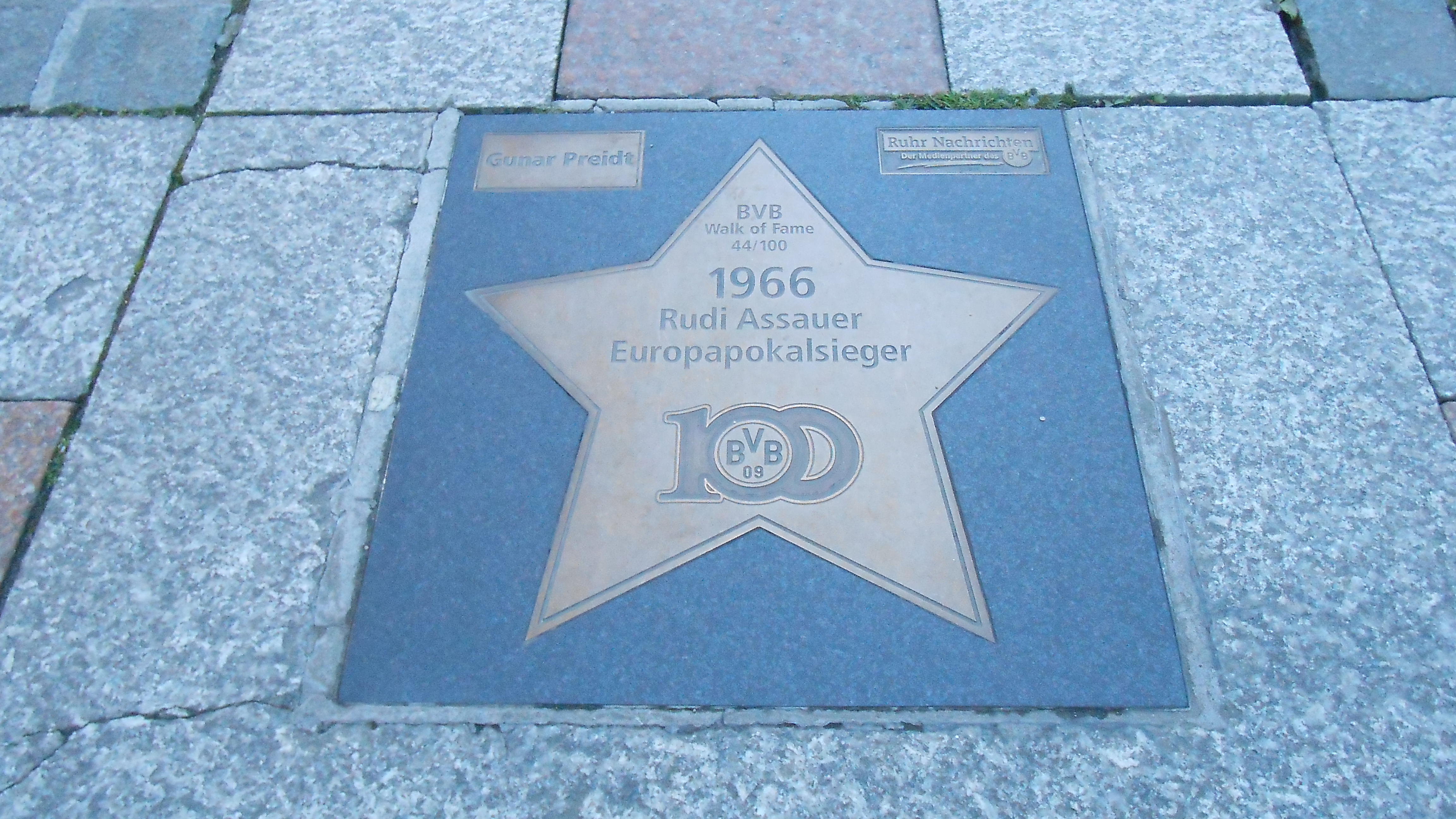 BVB Walk of Fame 44-100ː 1966 Rudi Assauer Europapokalsieger